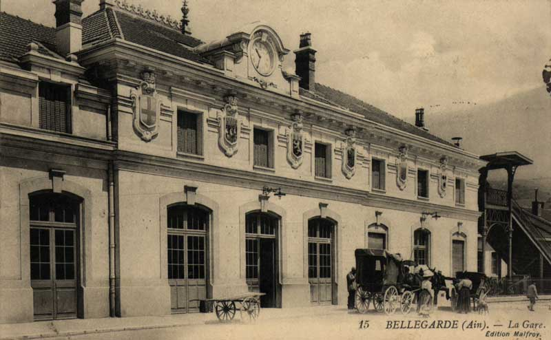 une carte postale ancienne de la facade de la gare de bellegarde